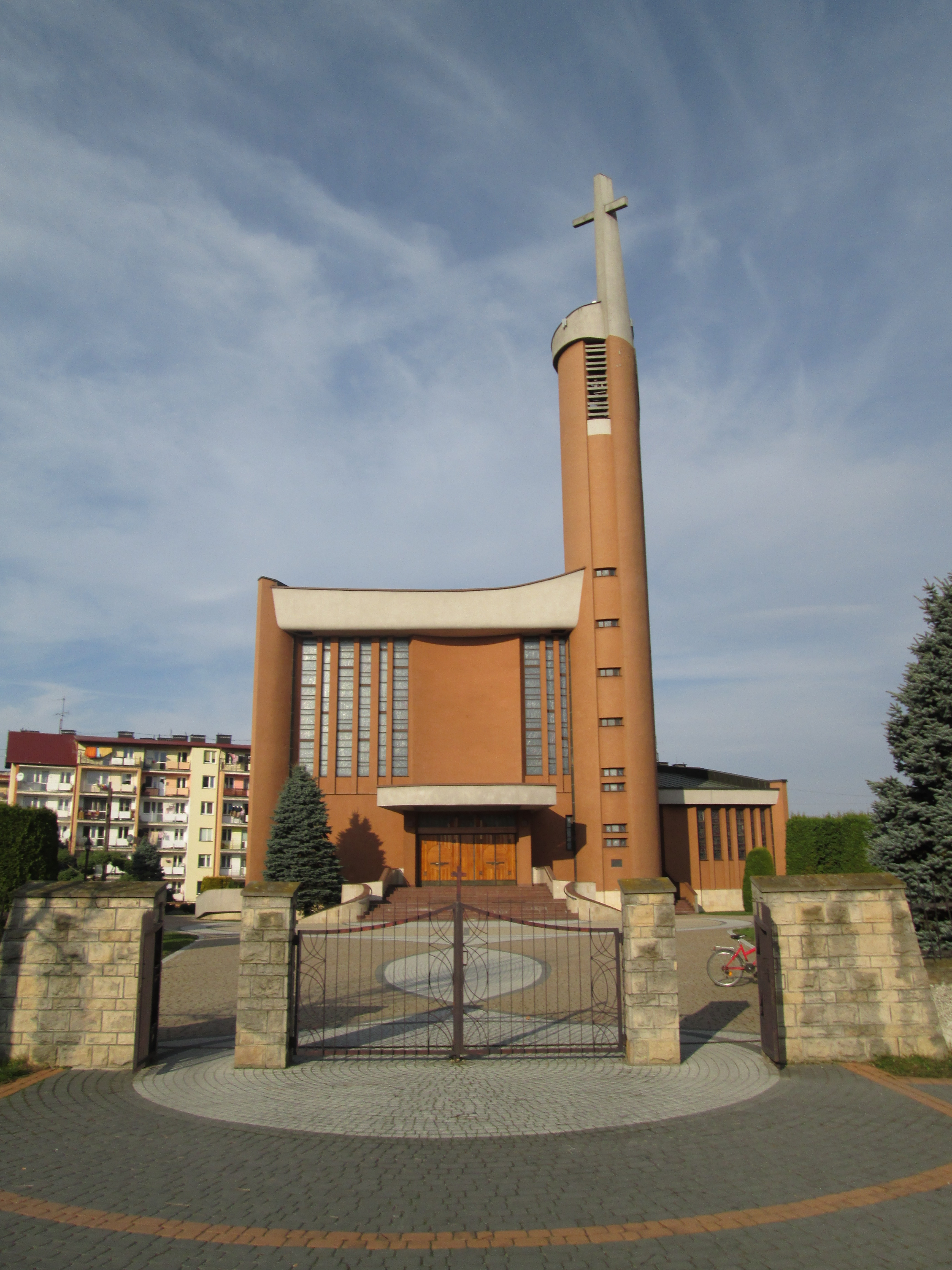 Kościól pw. św. Krzyża w Dębicy